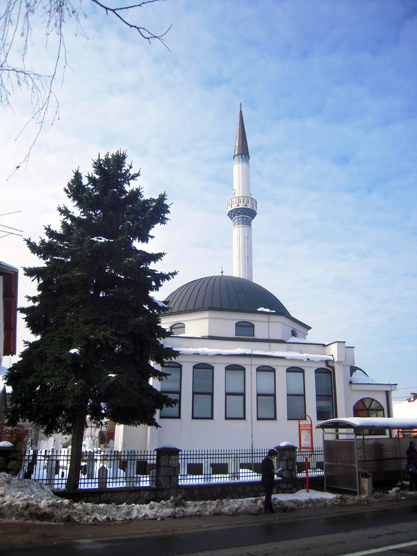 Vrbanjska džamija